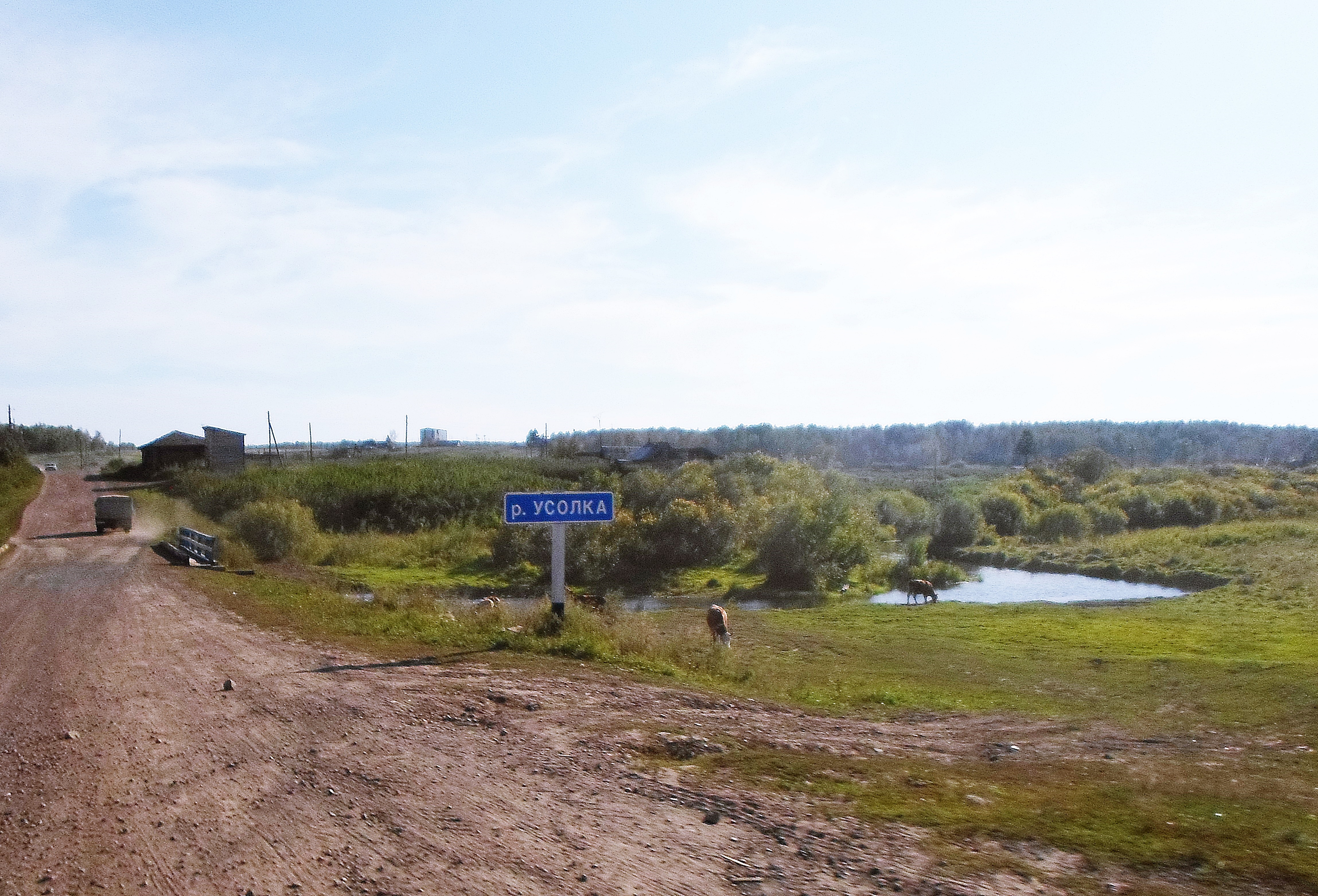 Река Усолка, левый приток Тасеевой, в селе Устьянск. Абанский район Красноярского края.